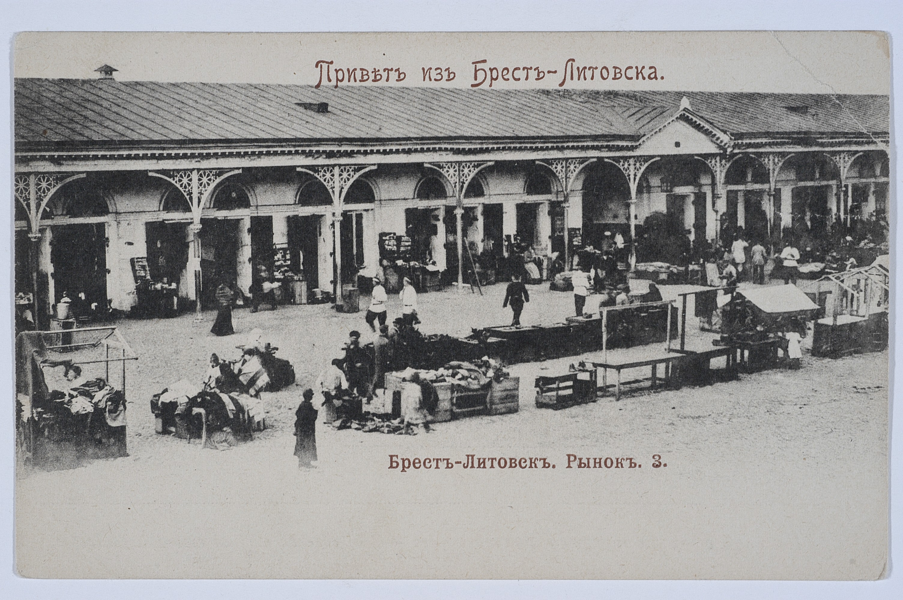 Беларуская (тарашкевіца): Берасьце (Bieraście), вуліца Шашэйная (vulica Šašejnaja). Гасьціны Двор (Haściny Dvor)